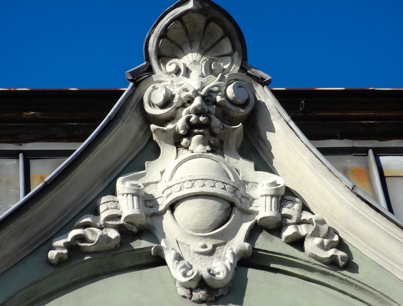 Kamienica przy ul. Cieszkowskiego 24 – Pomorska 50 w Bydgoszczy (1896-1899, Karl Bergner)